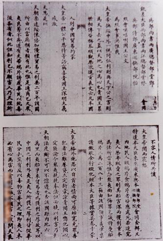 {Description }